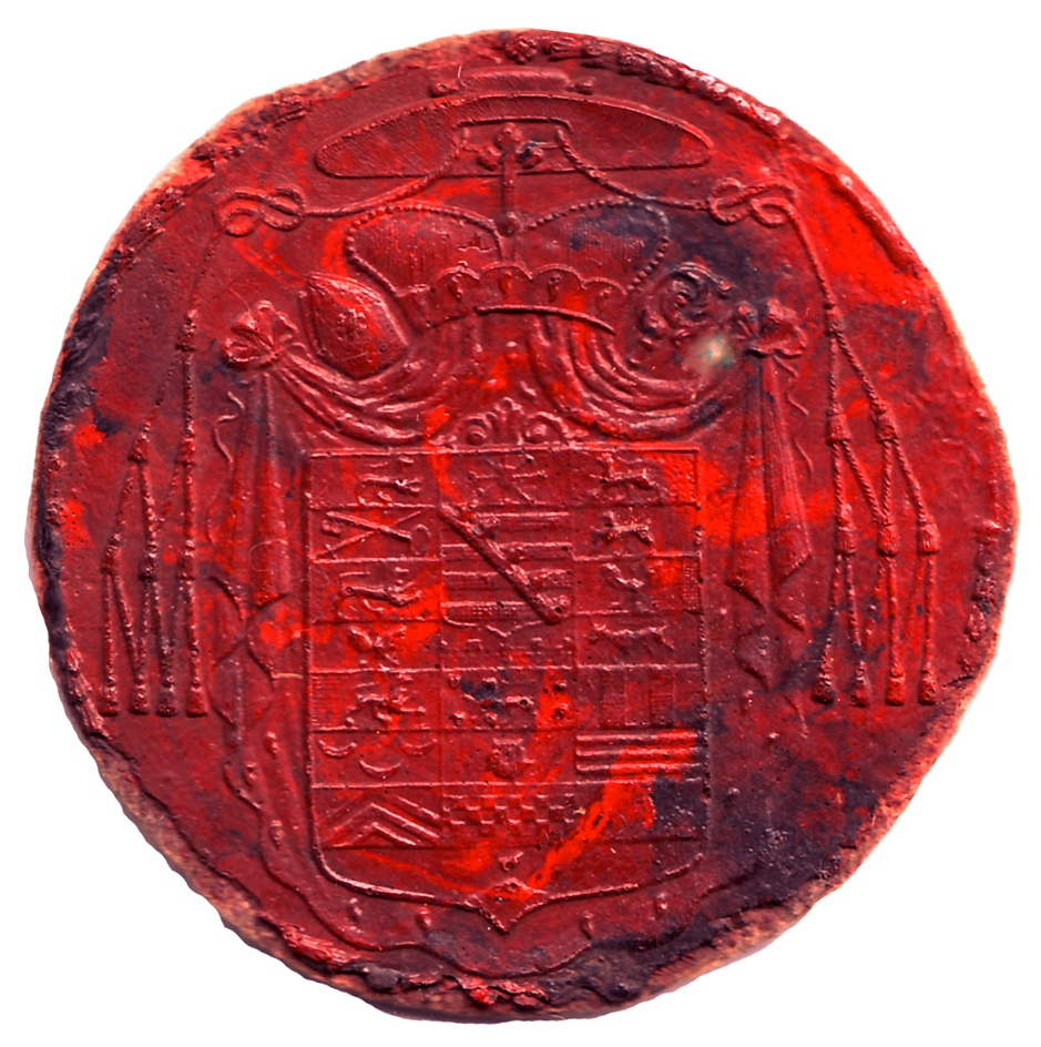 Mořic Adolf Sachsen-Zeits, 8.biskup Hradecký-1732-1733 a 5.biskup Litoměřický 1733-1759; pečeť biskupa.